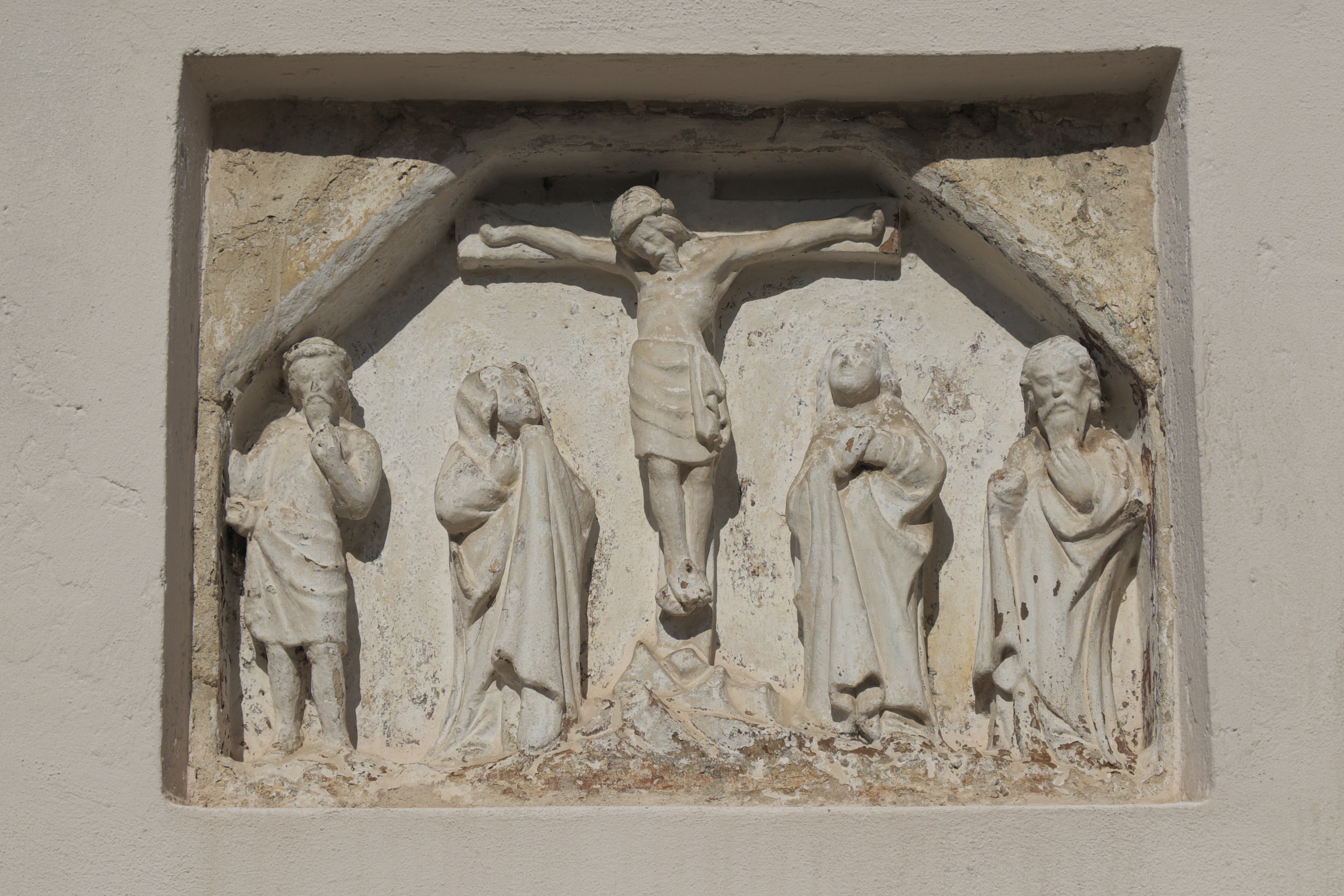 Katholische Pfarrkirche St. Jakobus in Vierkirchen im Landkreis Dachau (Bayern/Deutschland), Relief mit Kreuzigungsgruppe